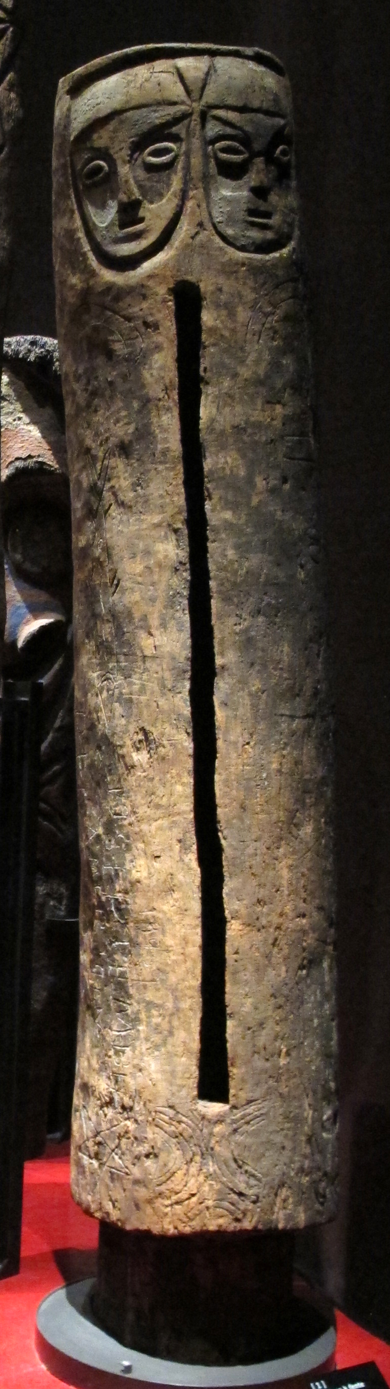 Musée du quai Branly